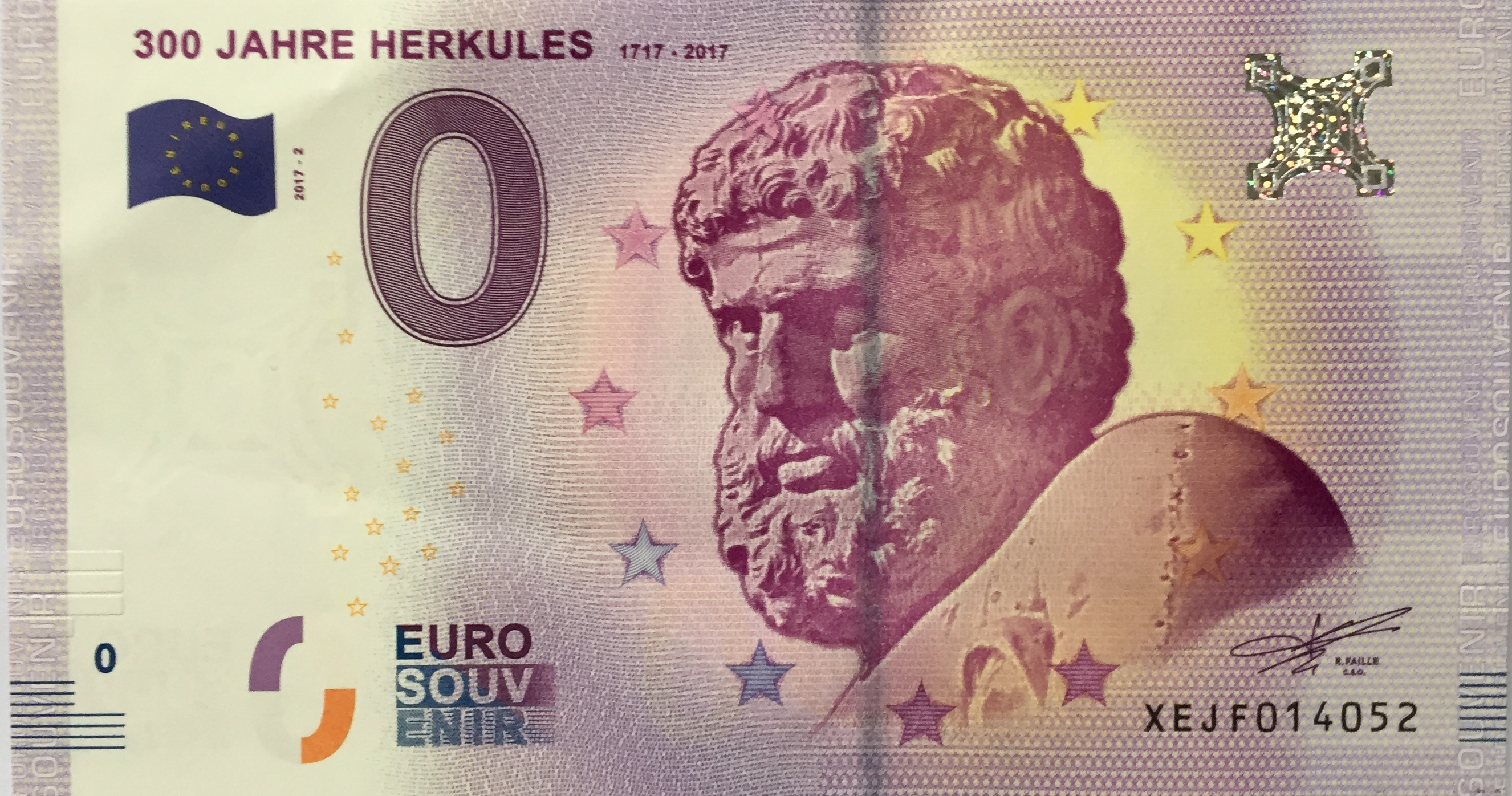 0-Euro-Schein Herkules, Kassel, 2. Auflage